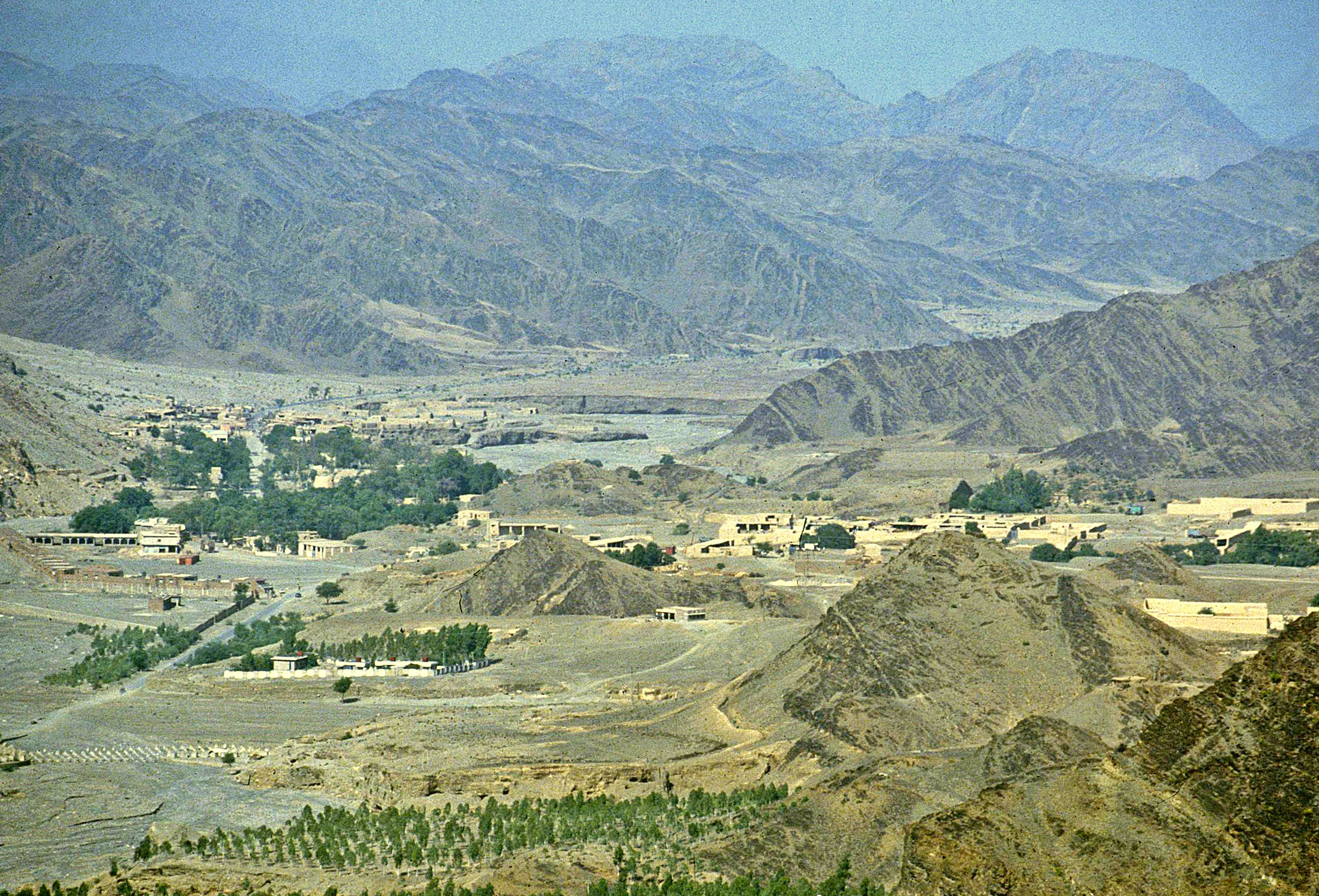 Blick vom Khyberpaß nach Afghanistan